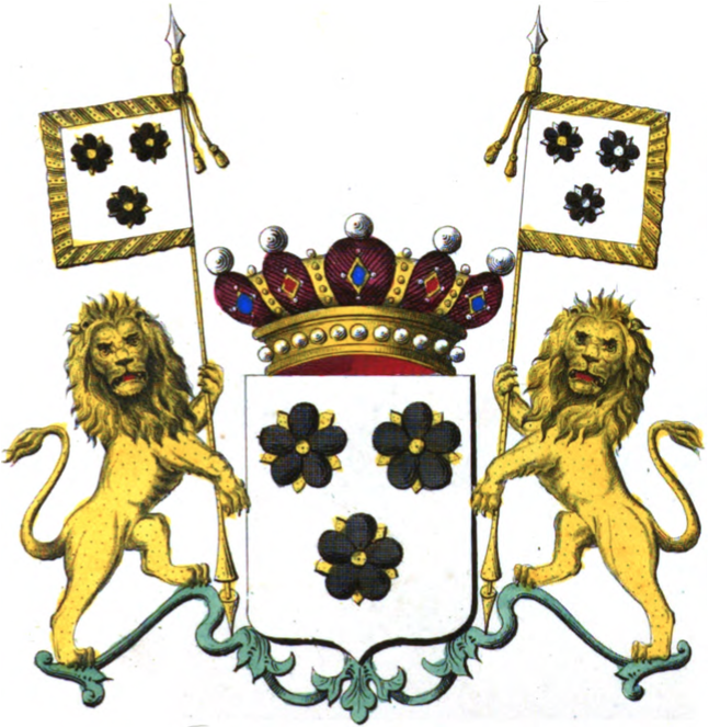 Armoiries de la famille Snoy et d'Oppuers.